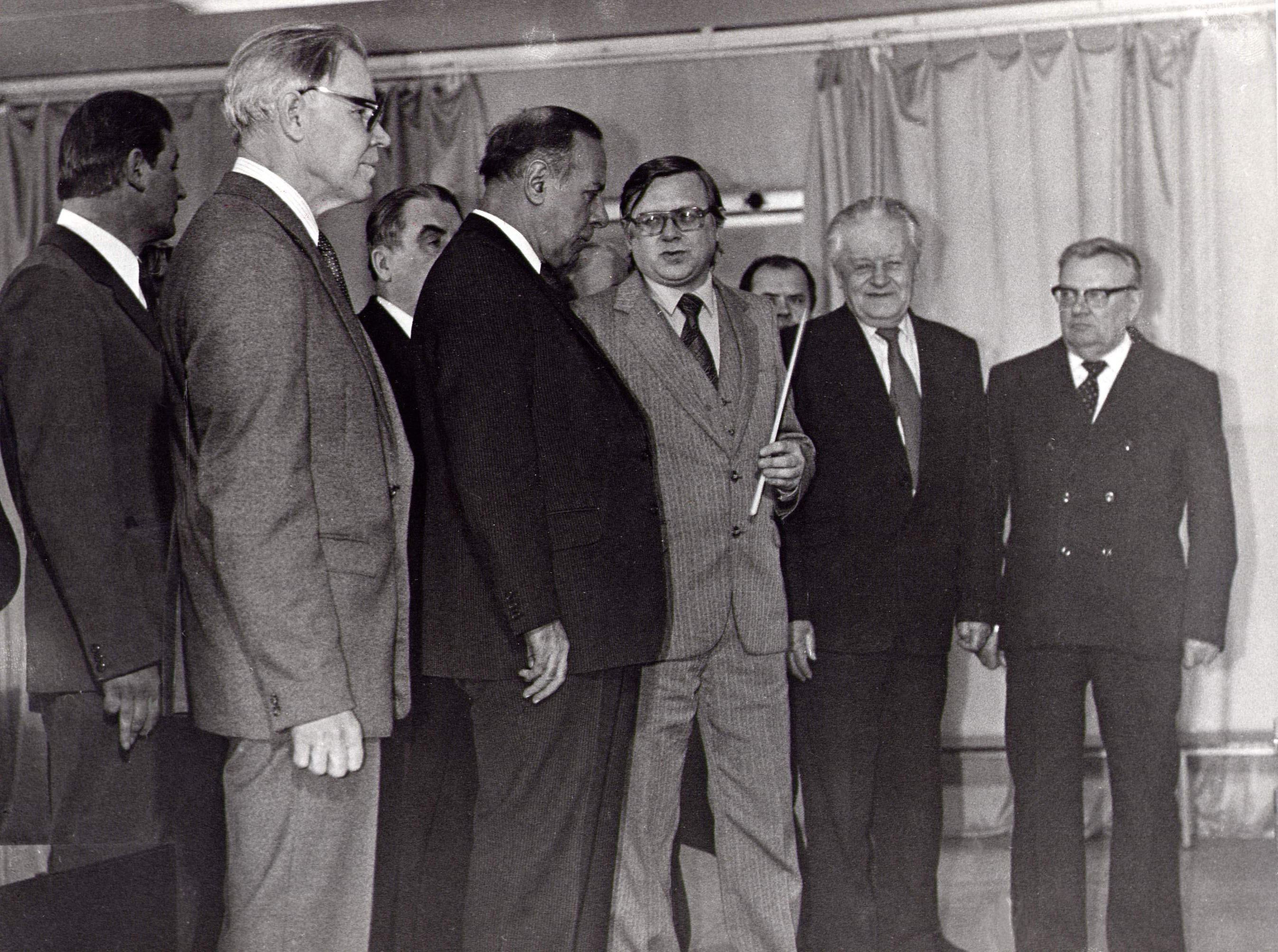 Осмотр экспозиции Музея археологии Алтая